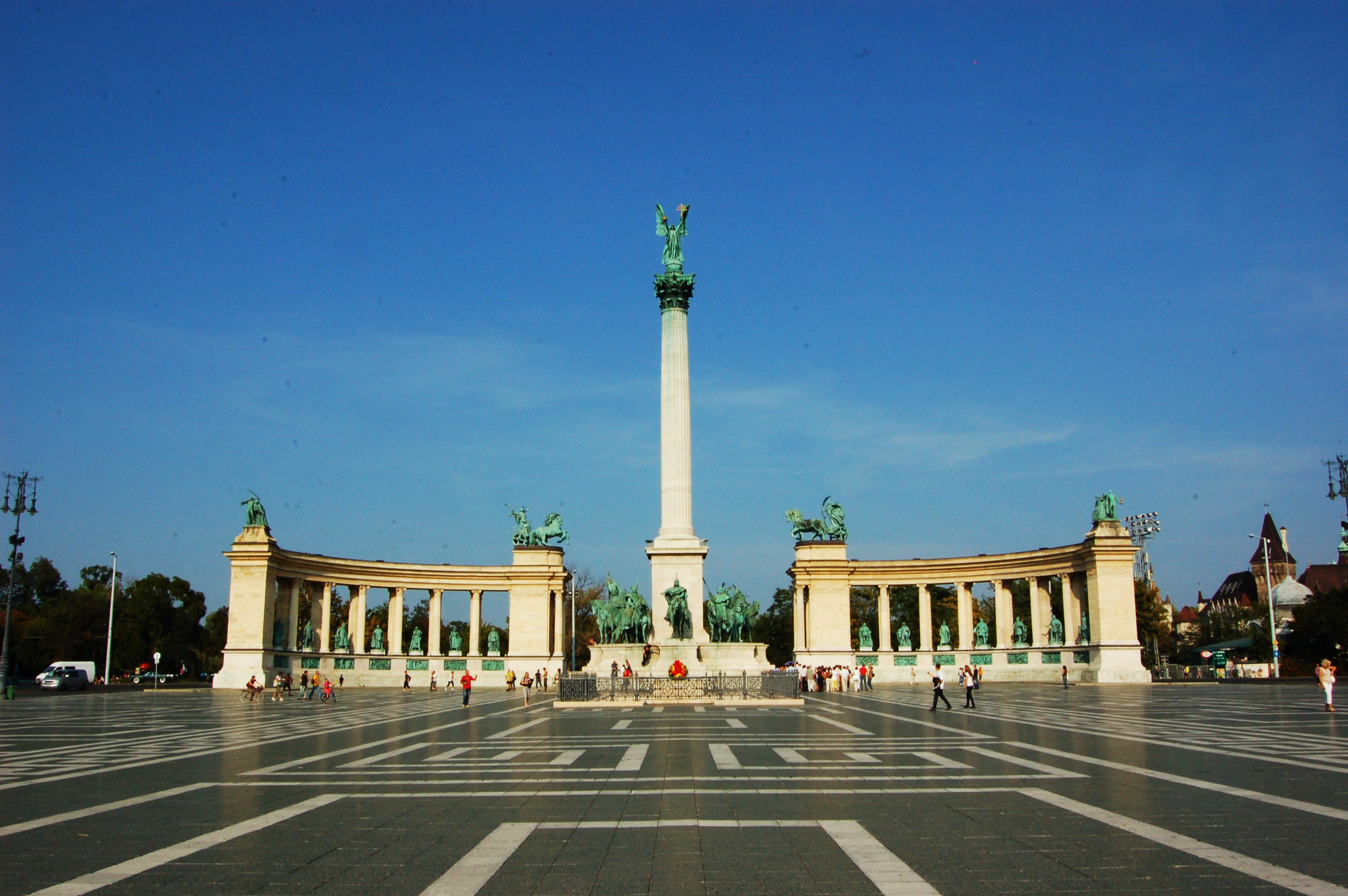 Heroes Square, Budapest.